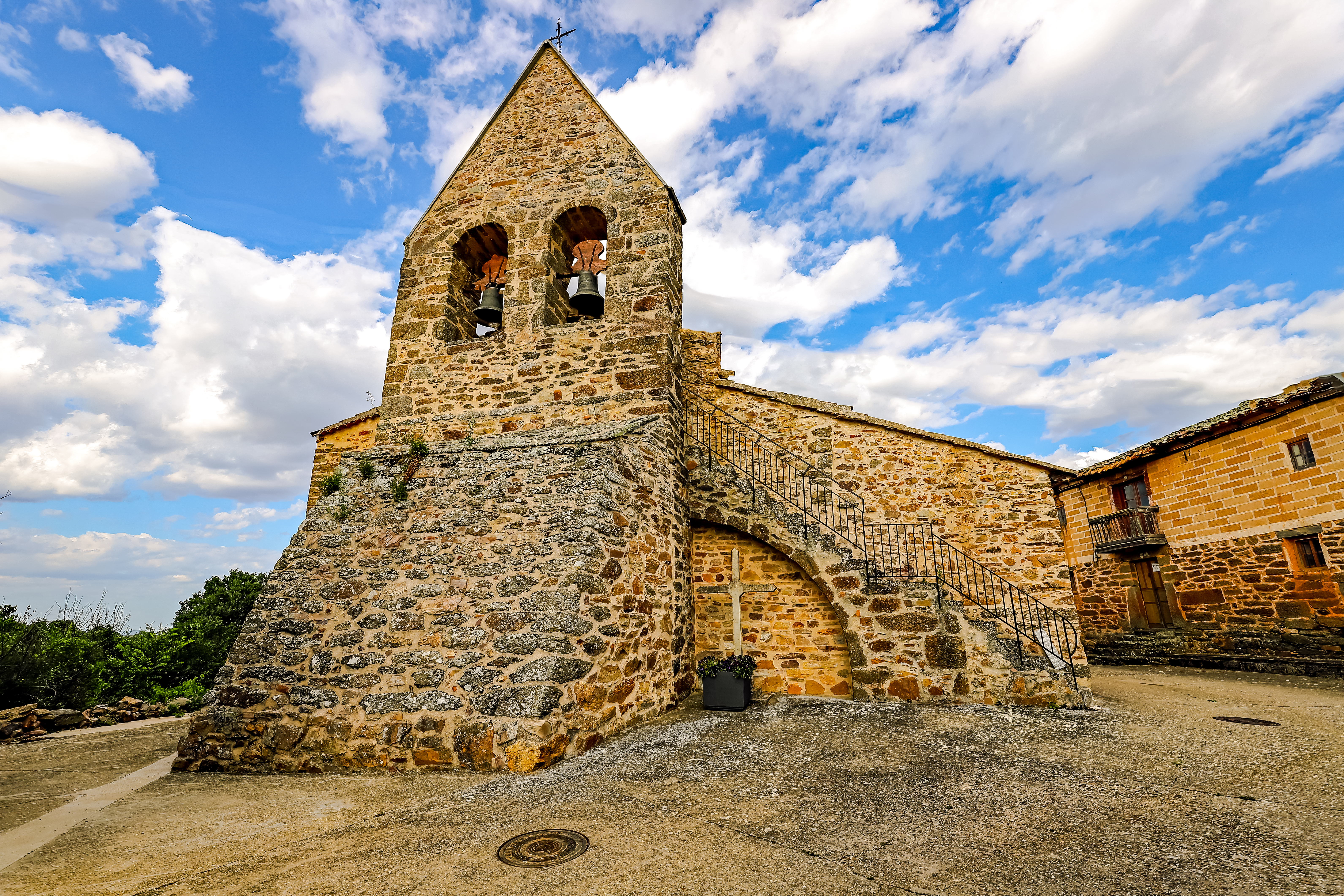 Otero de Bodas es un municipio de la comarca de La Carballeda, en la provincia de Zamora.